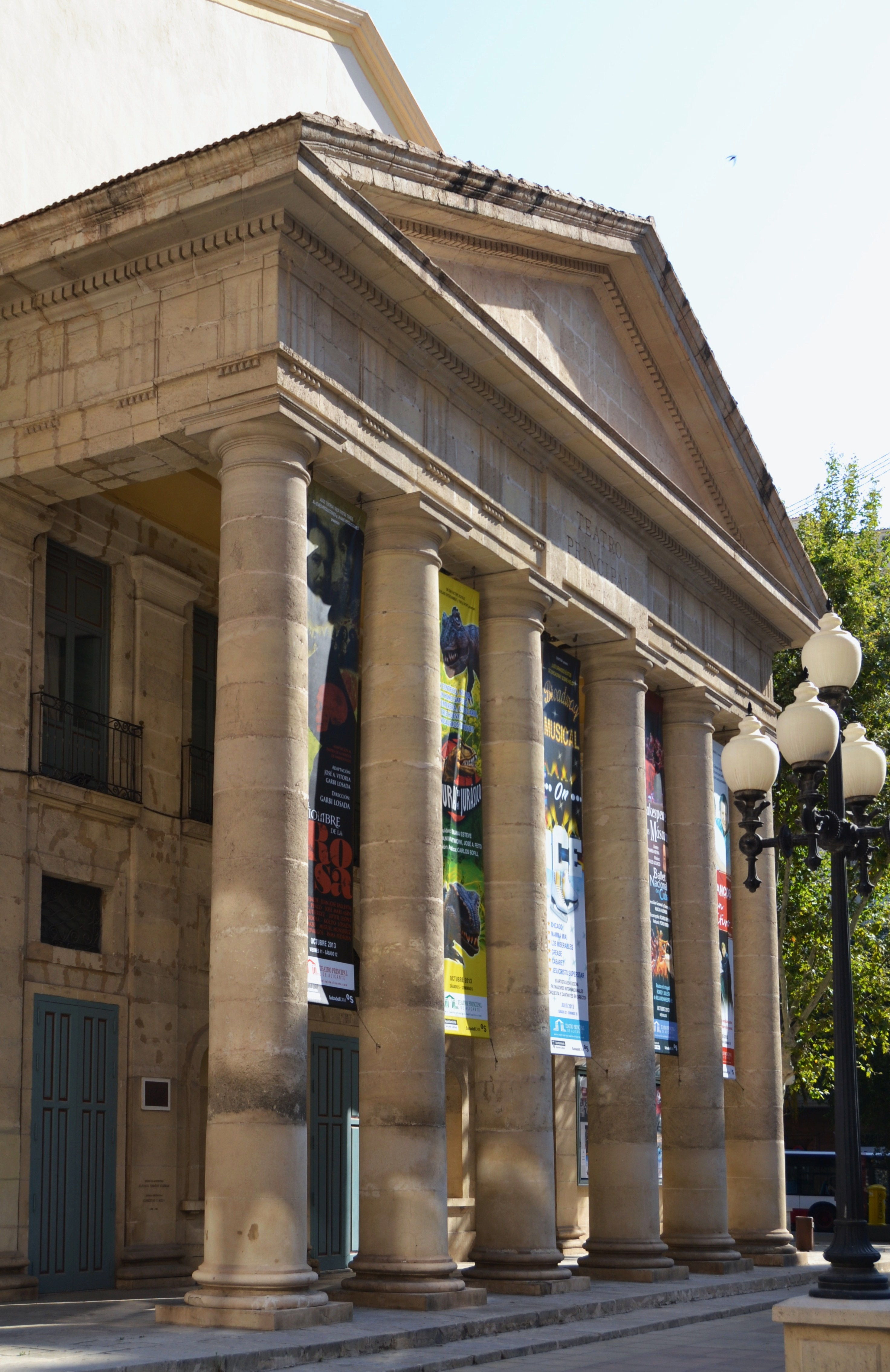 Pòrtic del teatre Principal, Alacant. 32.014-040.